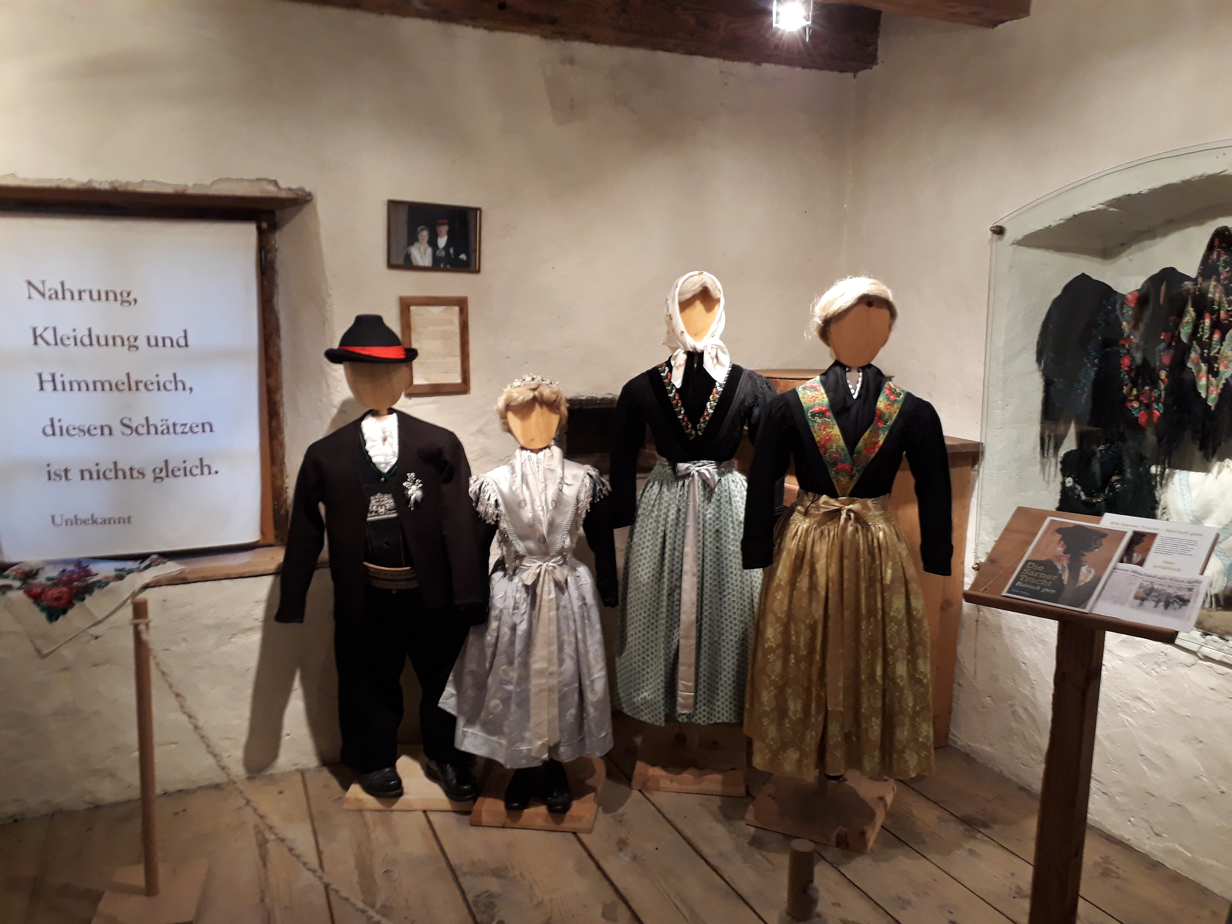 Traditionelle Tracht aus dem Sarntal, Südtirol.